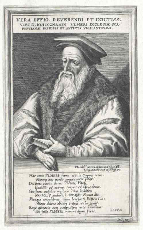 Porträt des Schaffhauser Reformators Johann Conrad Ulmer (1519-1600)